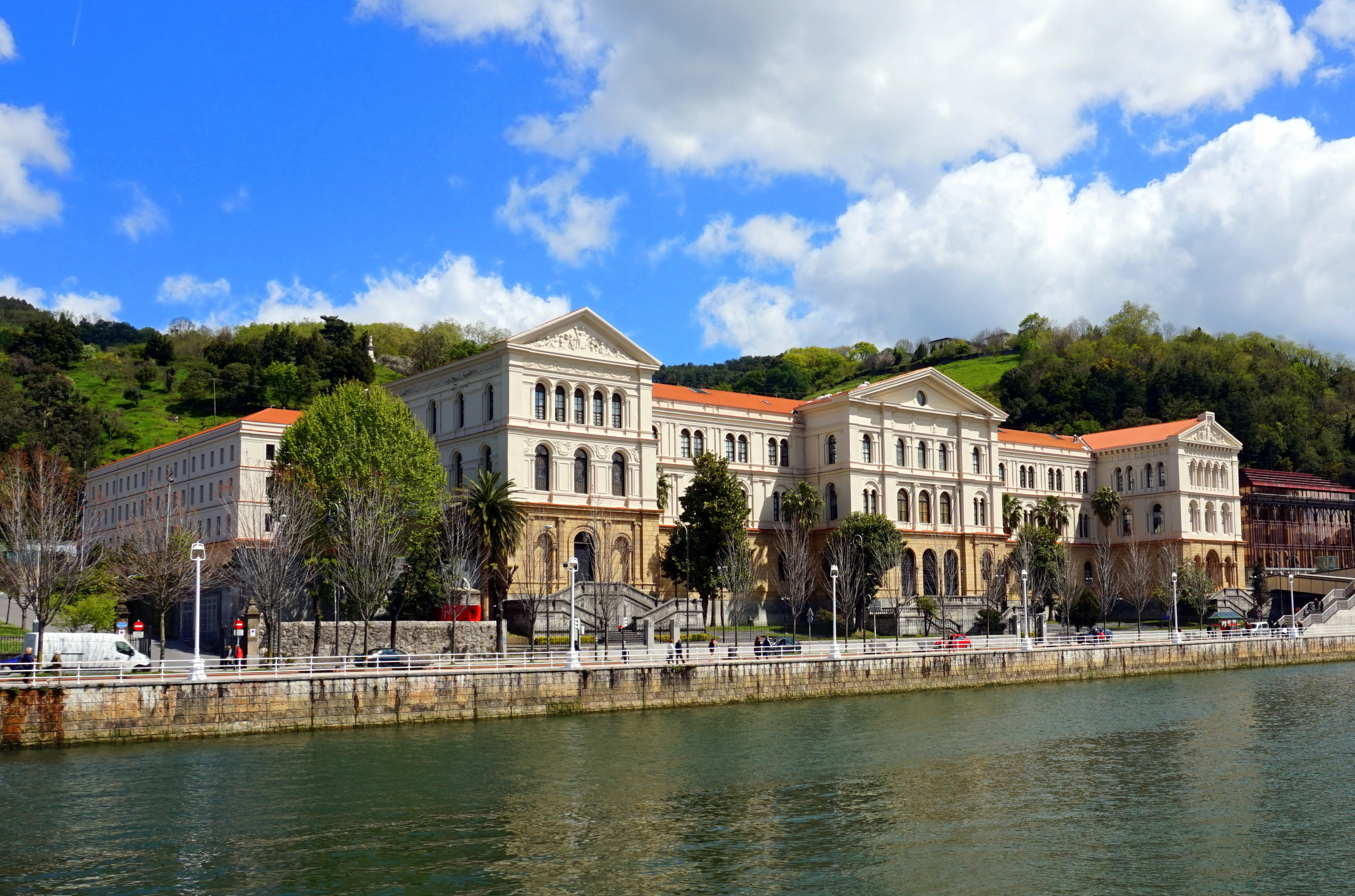 Universidad de Deusto, Bilbao